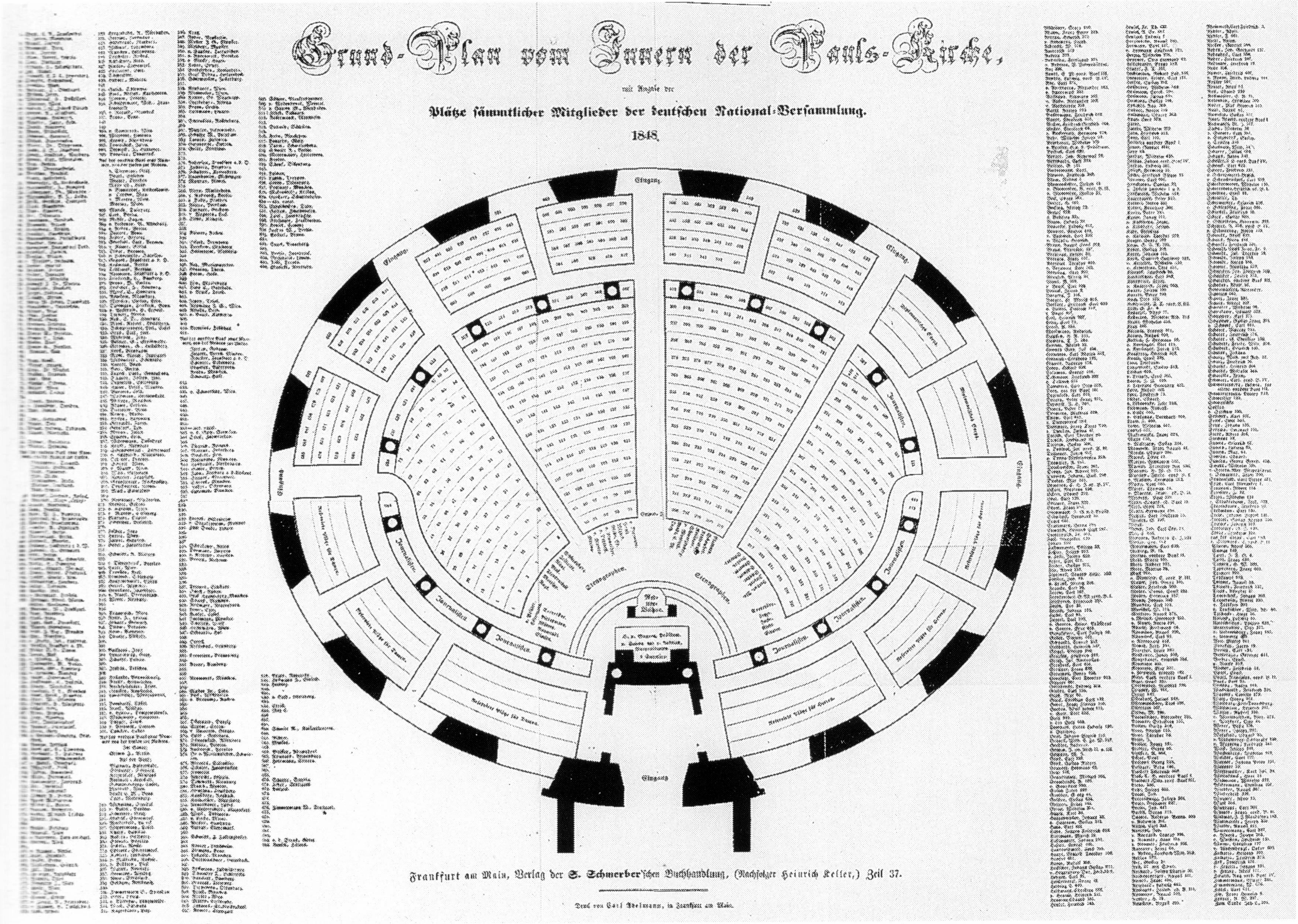 Lithographie. Grund-Plan vom Innern der Pauls-Kirche, mit Angabe der Plätze sämtlicher Mitglieder der deutschen National-Versammlung, 1848.